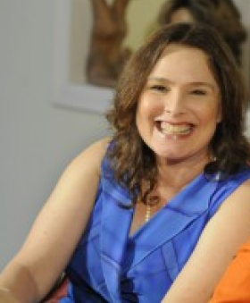 Louise Ferreira Cardoso (Rio de Janeiro, 17 de abril de 1955) é uma atriz brasileira.